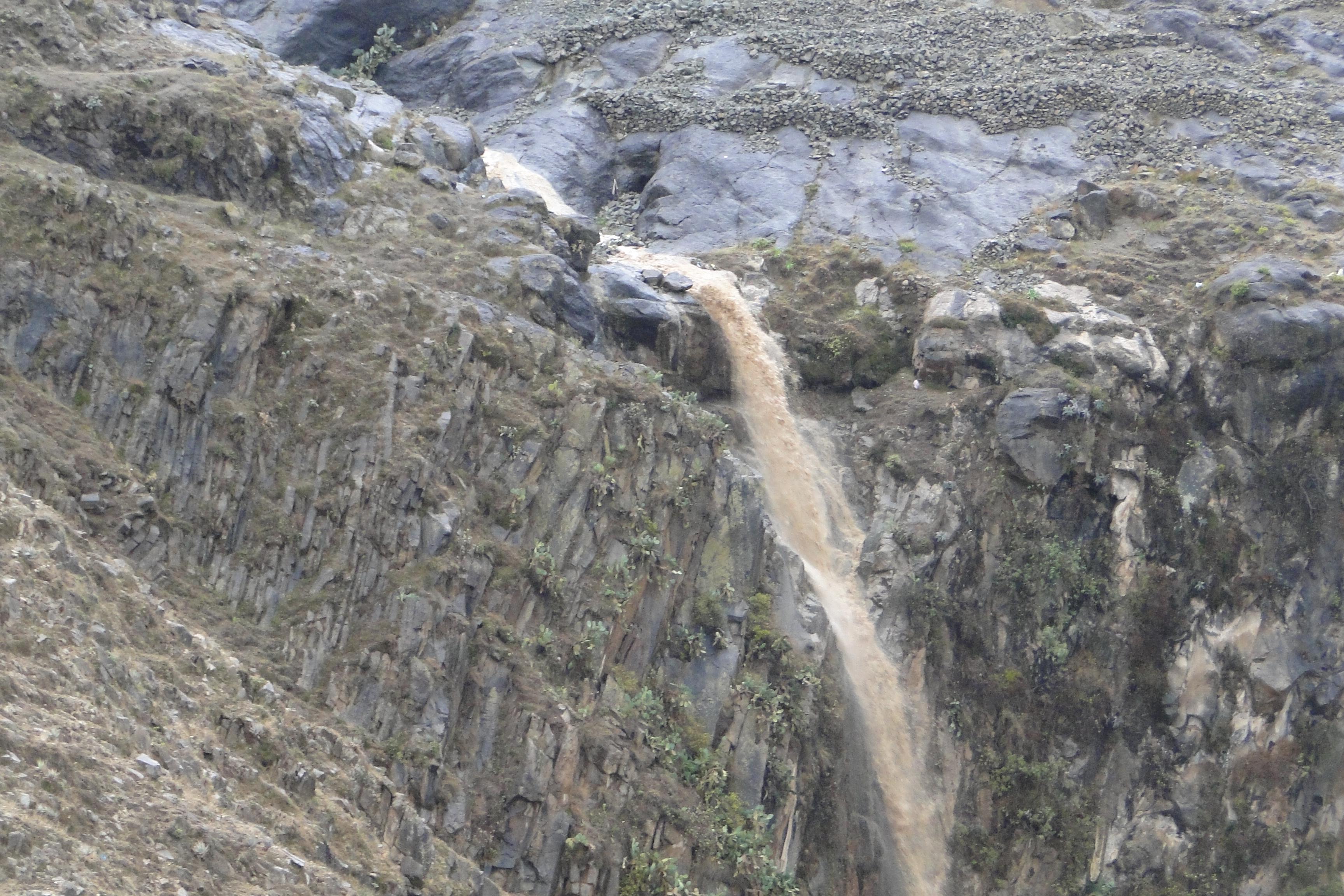 السربه محافظة ريمه بني الضبيبي البرار بني رضوان تاره بني هتار عرونه